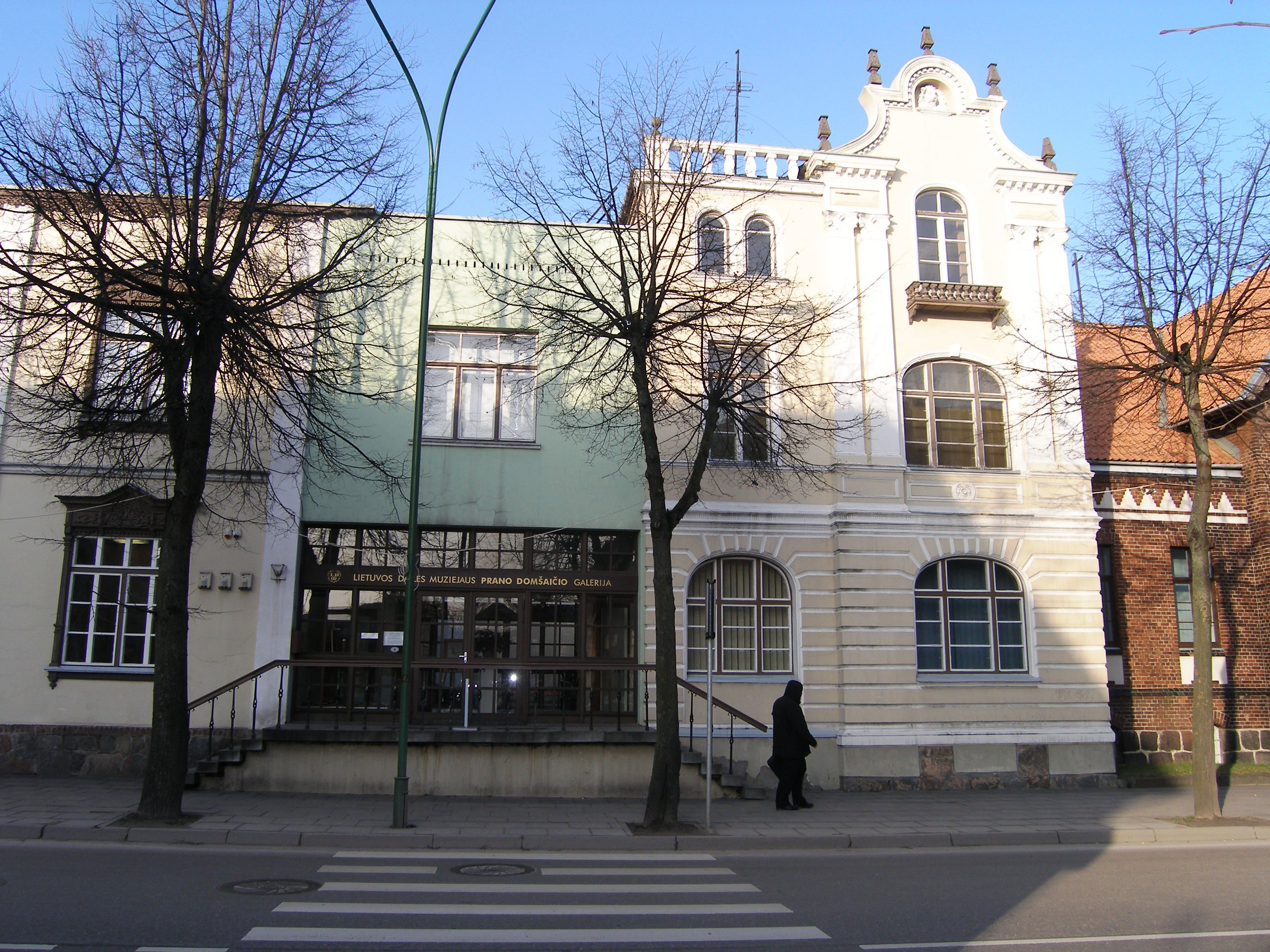 Prano Domšaičio galerija, Klaipėda Česky: Galerie Prana Domšaitise v Klaipėdě, ul. Liepų g. 33. Založena r. 1970, činná od r. 1973; až do roku 2004 pod názvem Klaipėdos paveikslų galerija (Klaipėdská obrazová galerie)